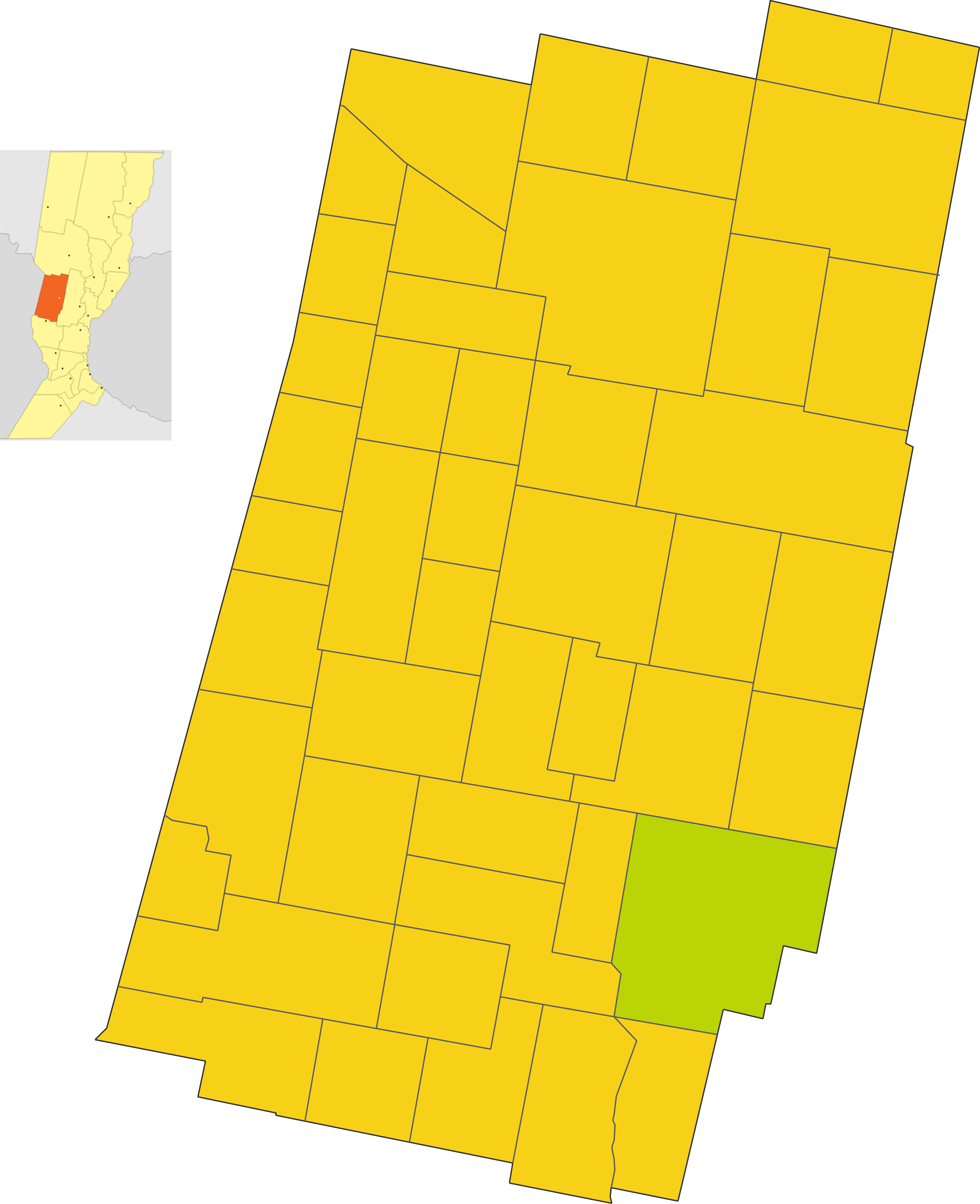 Map of the comuna de Angelica in Castellanos department, Santa Fe province, Argentina